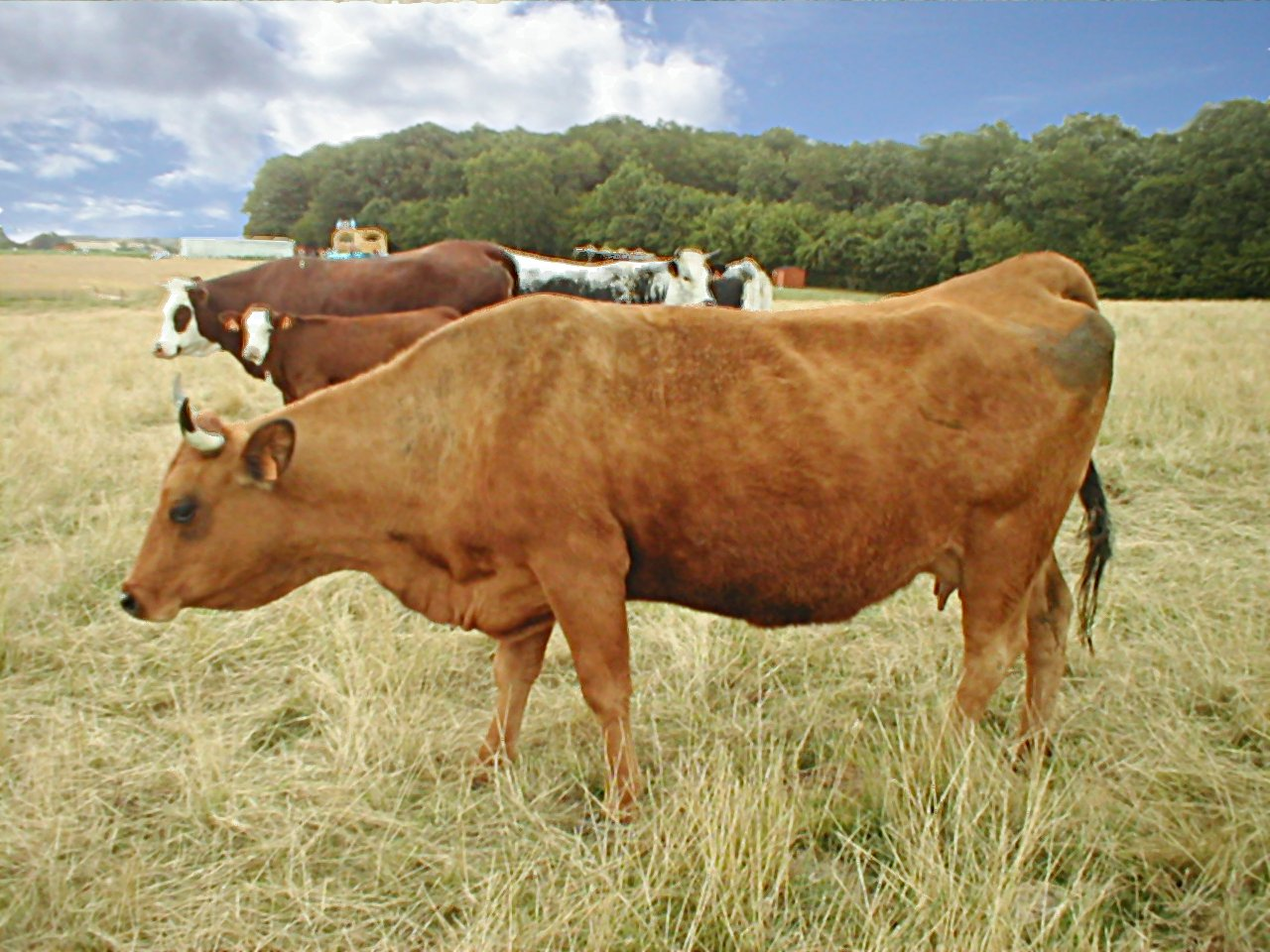 Une vache de race Tarentaise auteur : --Cyrille BERNIZET 15 fev 2005 à 01:15 (CET) Vache de race Tarentaise devant deux abondances et deux vosgiennes. Photo prise a Diverti'Parc, parc de loisirs nature en Bourgogne du Sud. Utilisation et publication autorisée par Diverti'Parc.